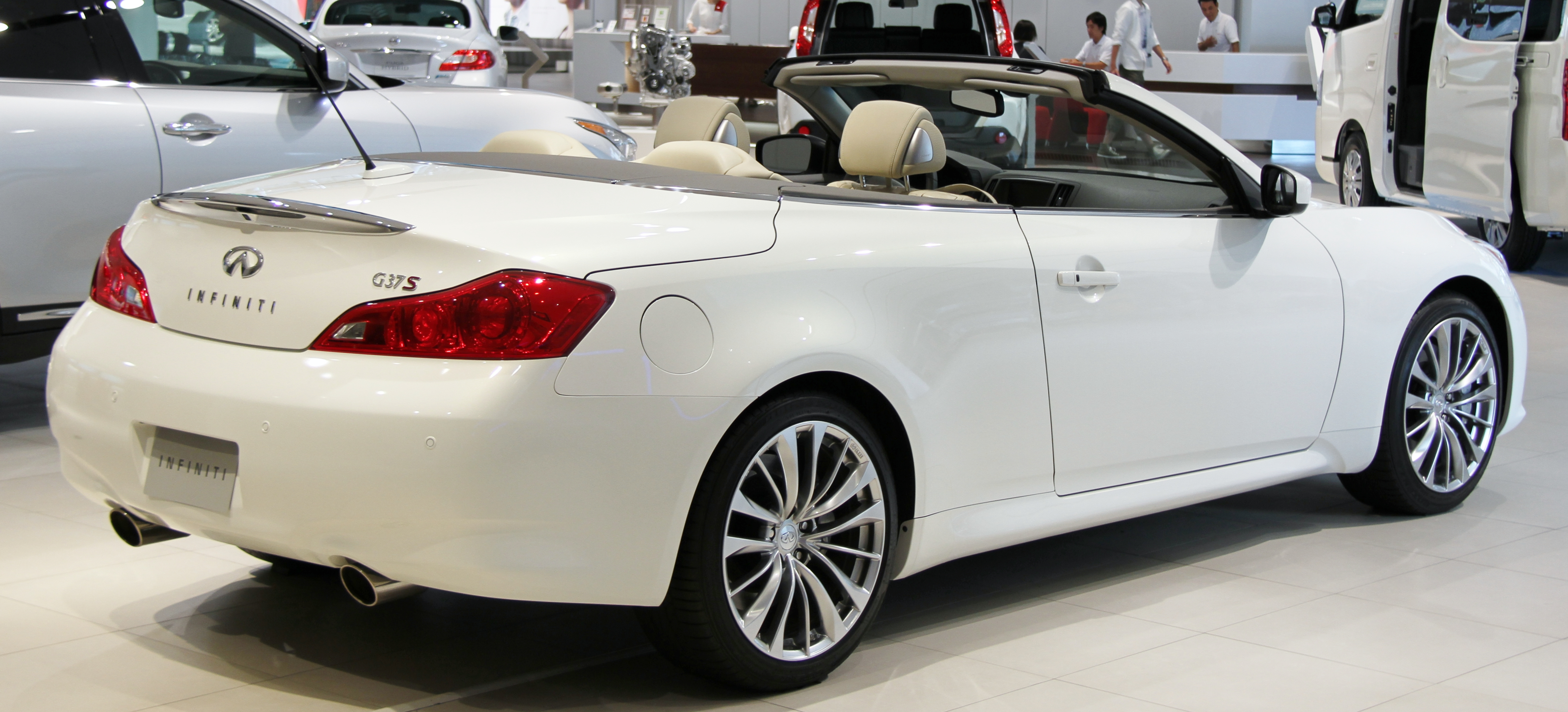 Infiniti G37S Convertible